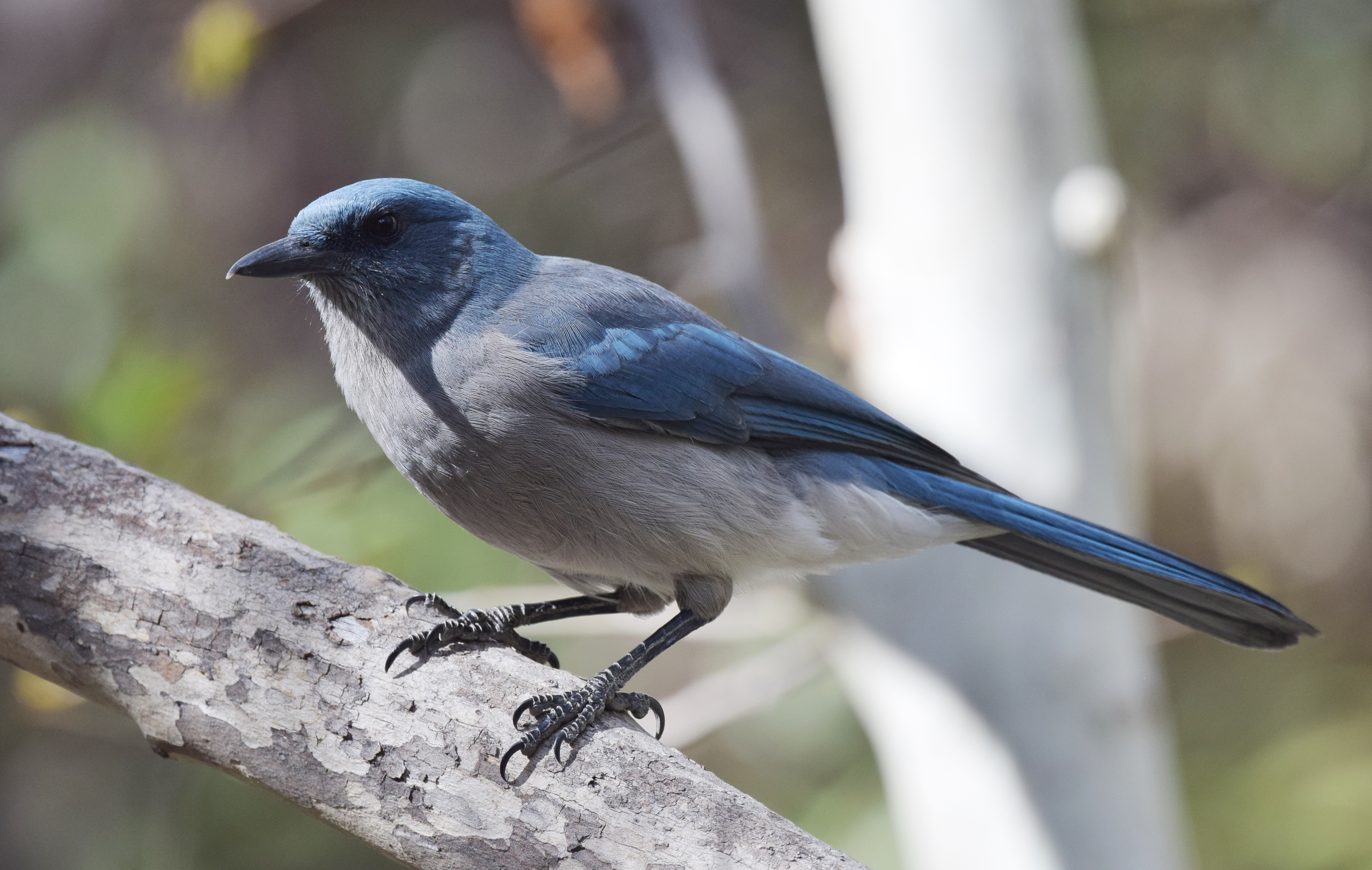 Arizona 4/4/17